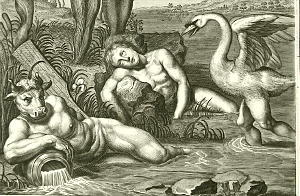 Cycnus